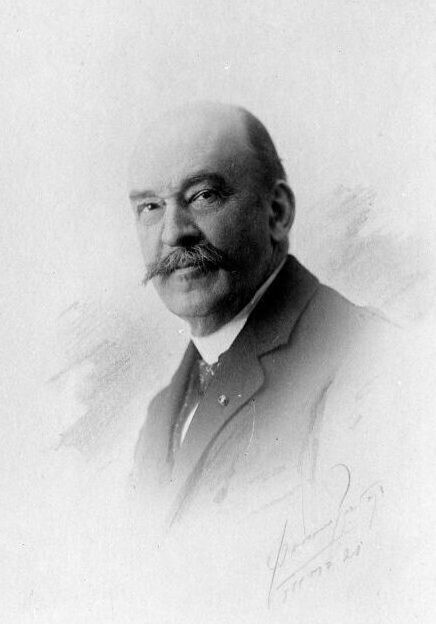 Repronegatief. Studioportret van Gouverneur-Generaal Mr. D. Fock